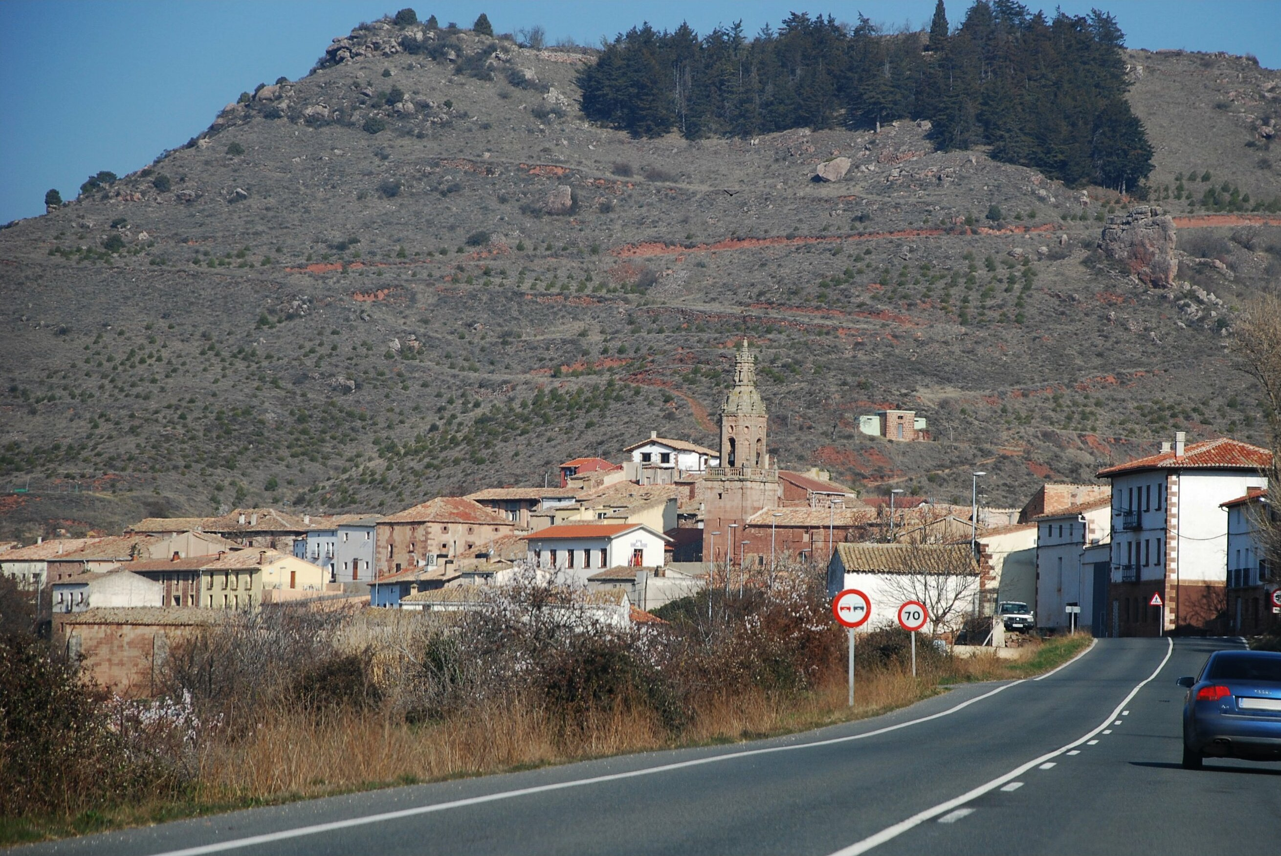 Mués, municipio de Navarra (España)